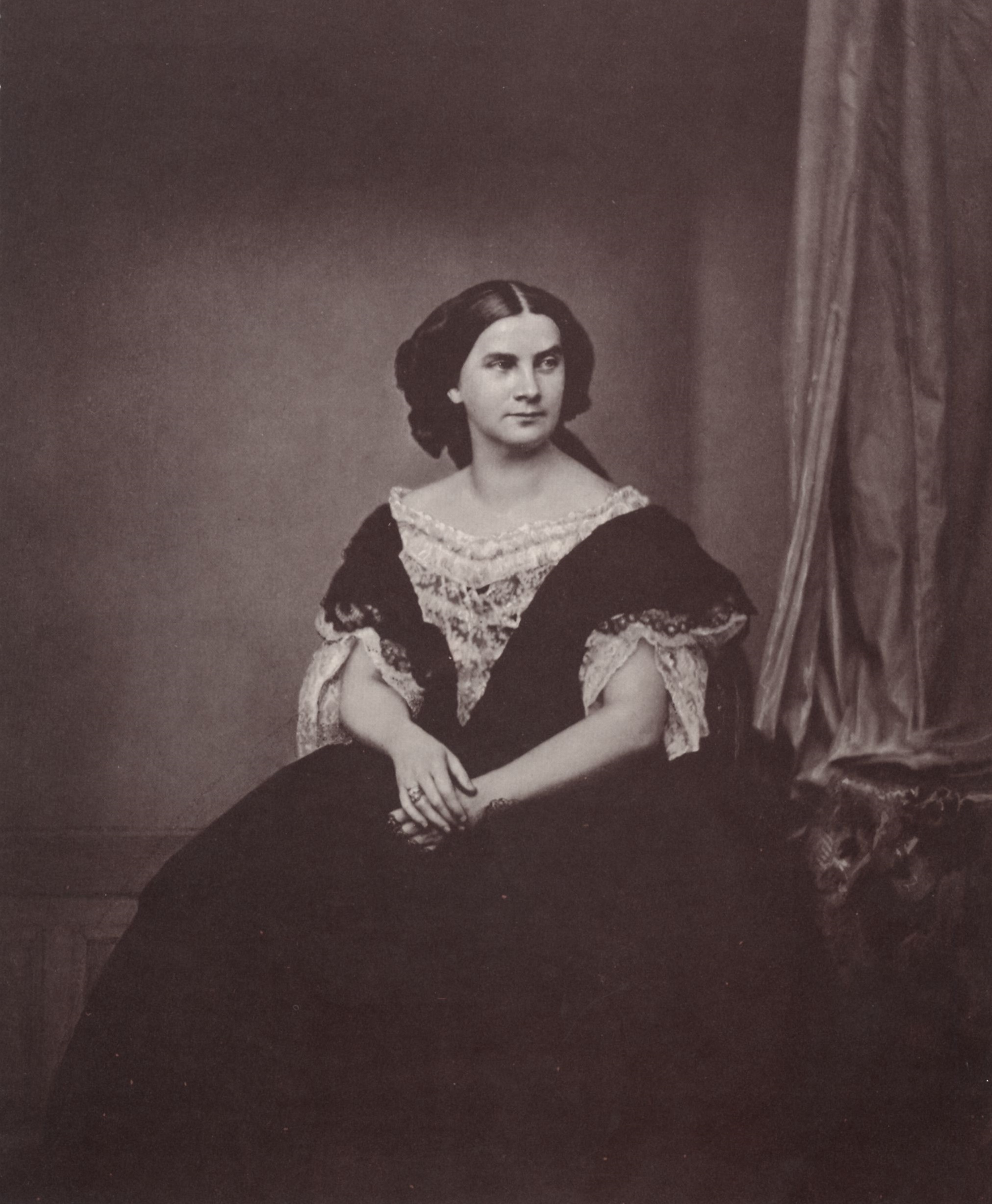 Hanfstaengl, Franz: Königin Marie von Bayern (1825-1889)